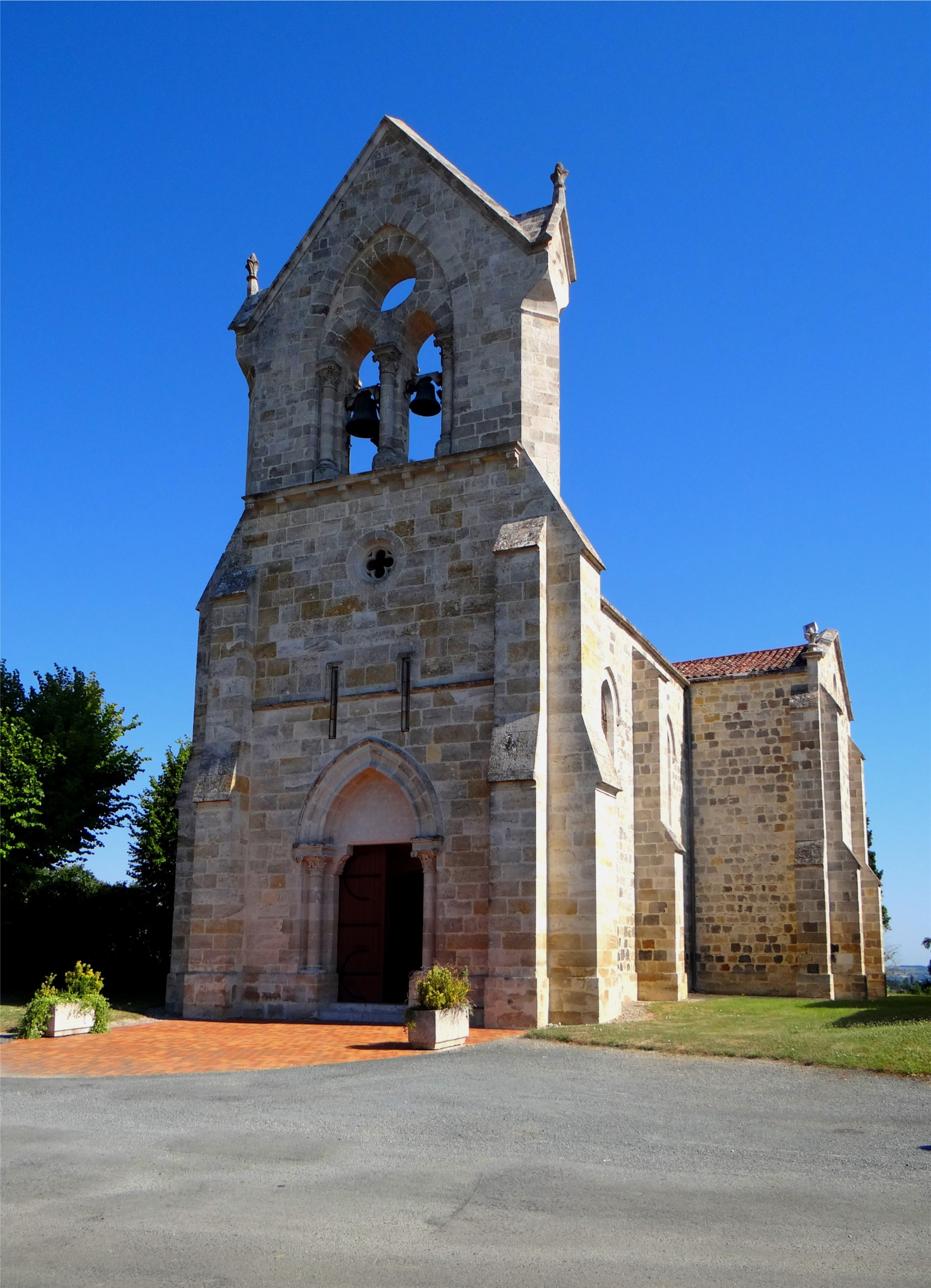 Église Saint-Pierre et Saint-Paul, Fieux, Lot-et-Garonne, France.